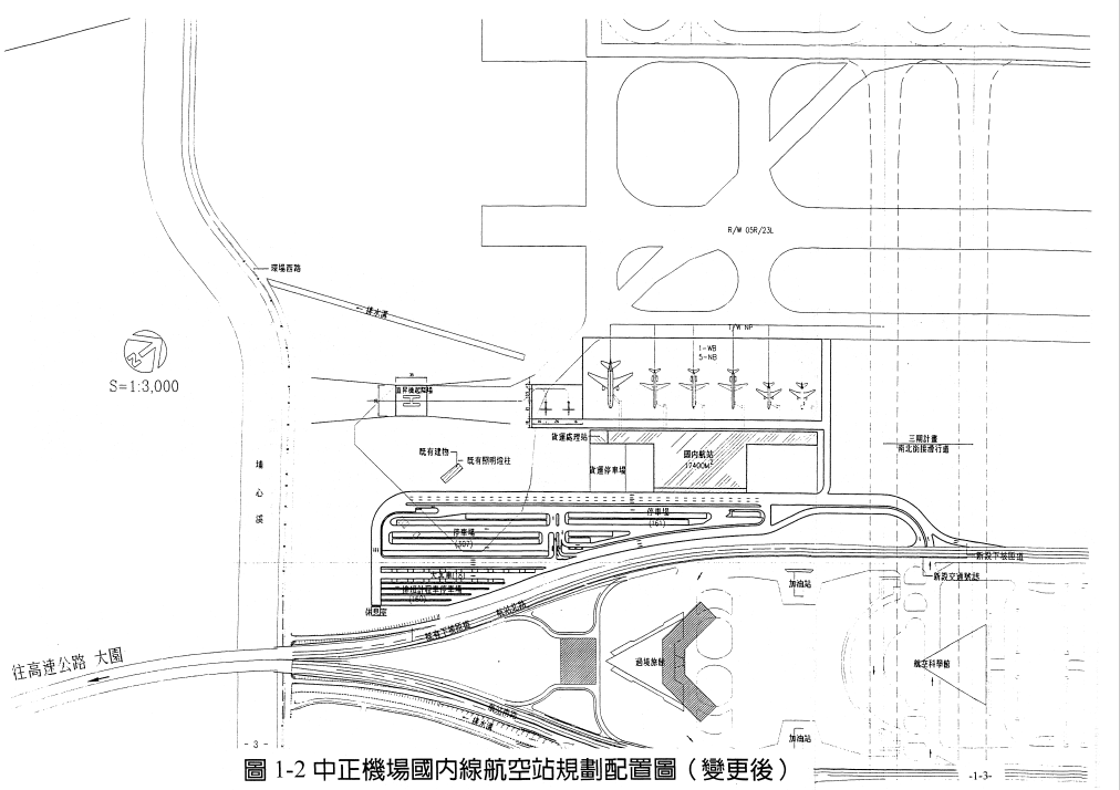 一張介紹臺灣桃園國際機場國內線航廈變更後的規畫的圖片。